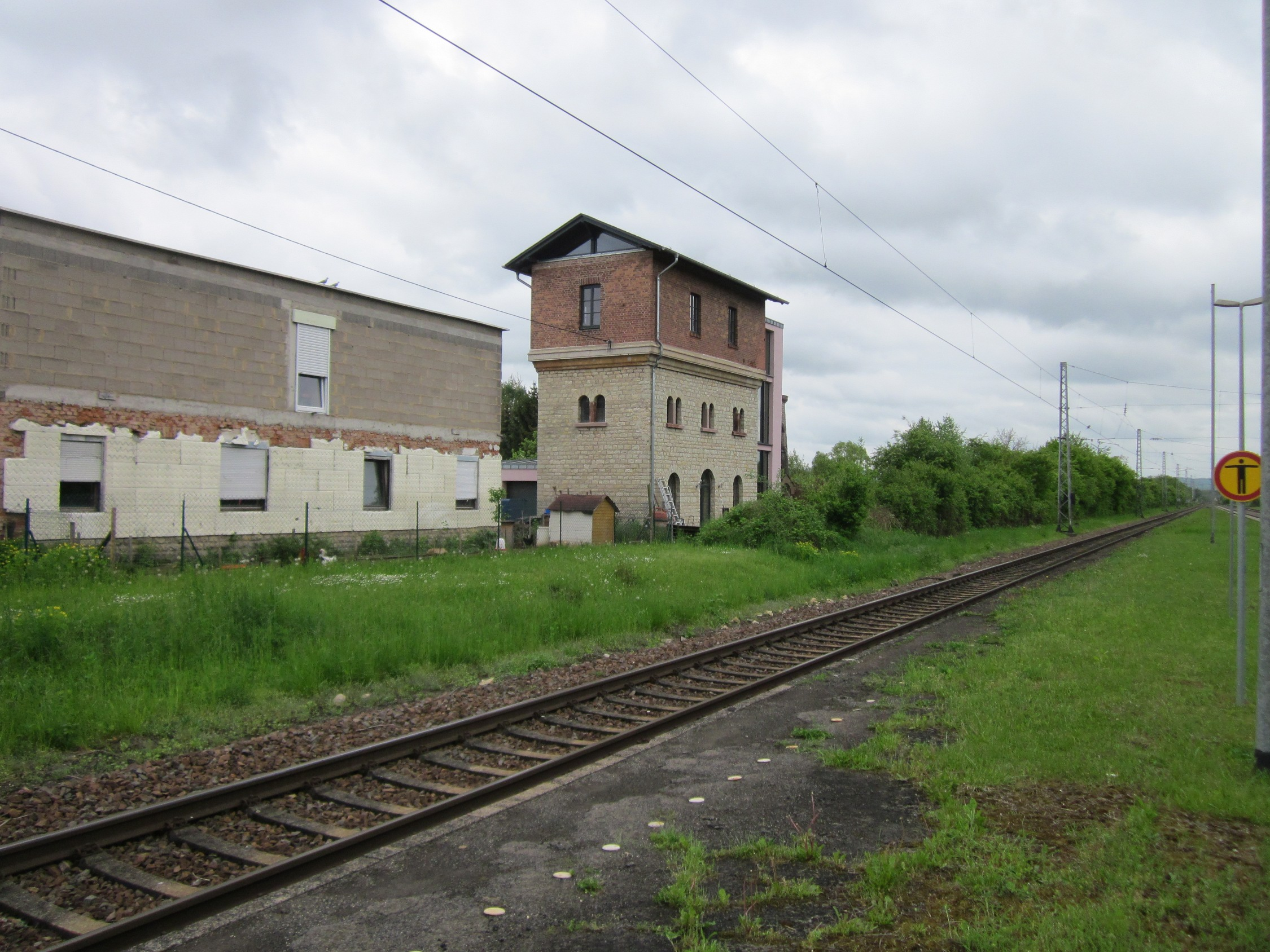 Bahnhof Nennig mit Stellwerk